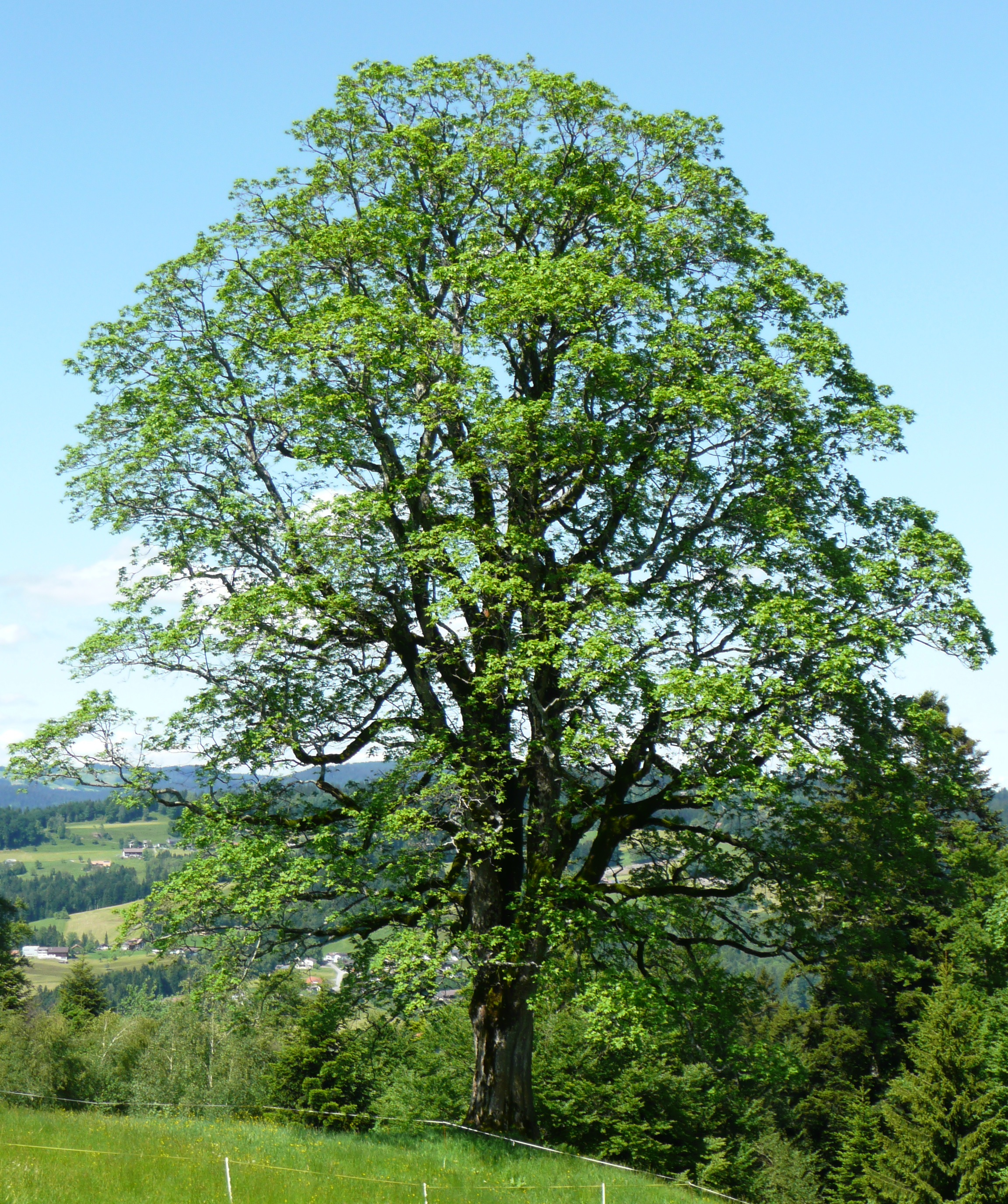 Bergahorn Ammenegg This media shows the natural monument in Vorarlberg with the ID 184.